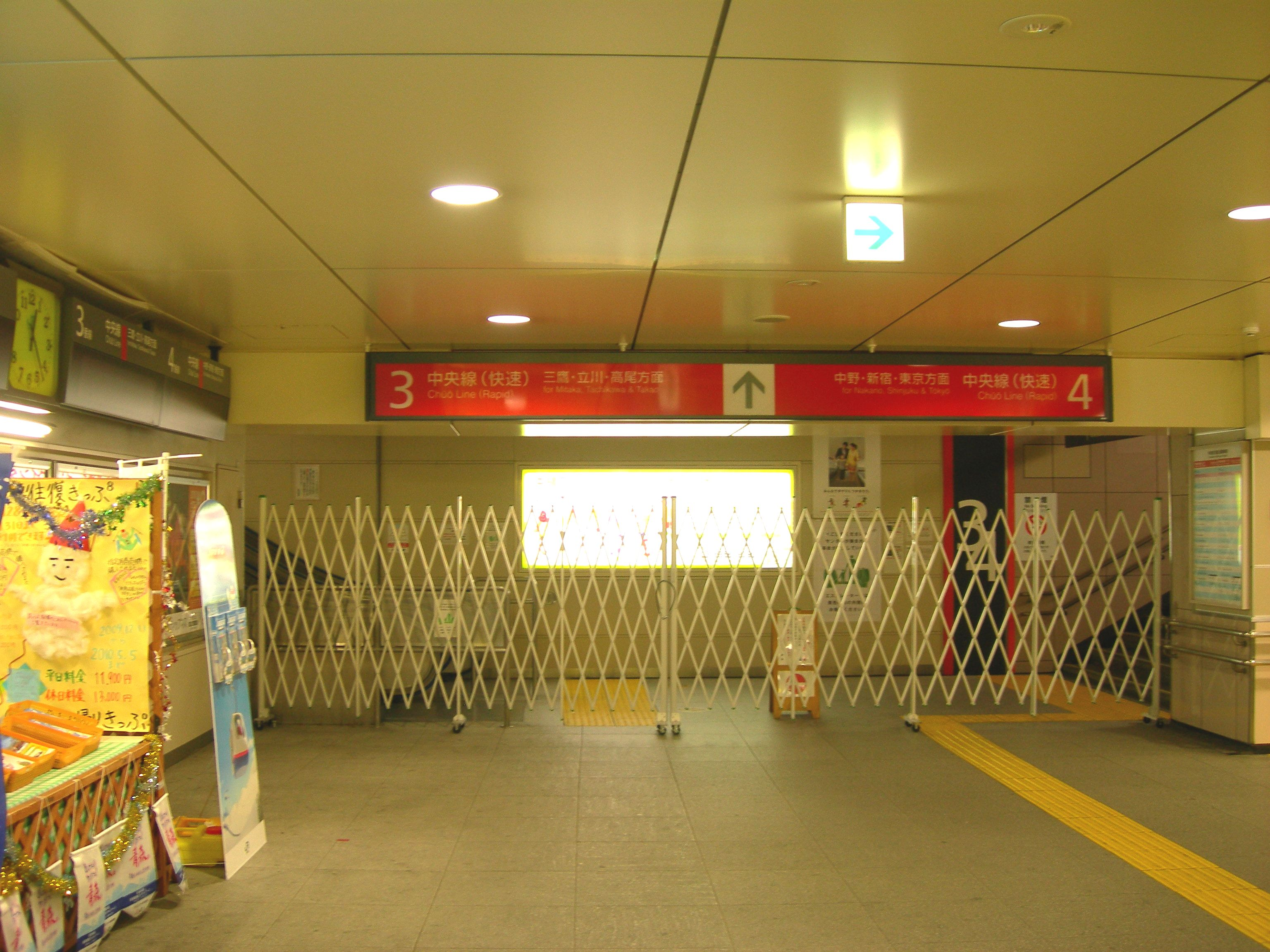 高円寺駅階段の踊り場で閉鎖された中央線ホームの入り口を撮る